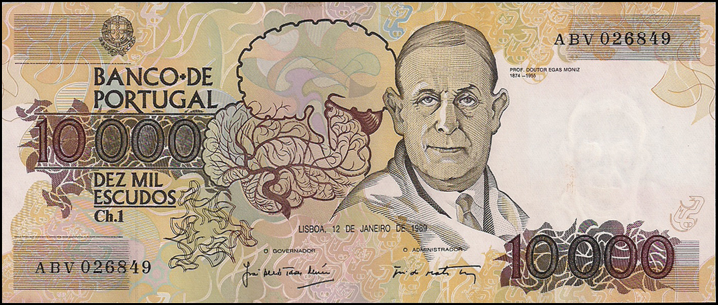 Vê-se a esfinge do Dr. Egas Moniz ladeado de dois encéfalos , sendo o mais distante com sinuantes artérias, uma alusão a sua principal descoberta.